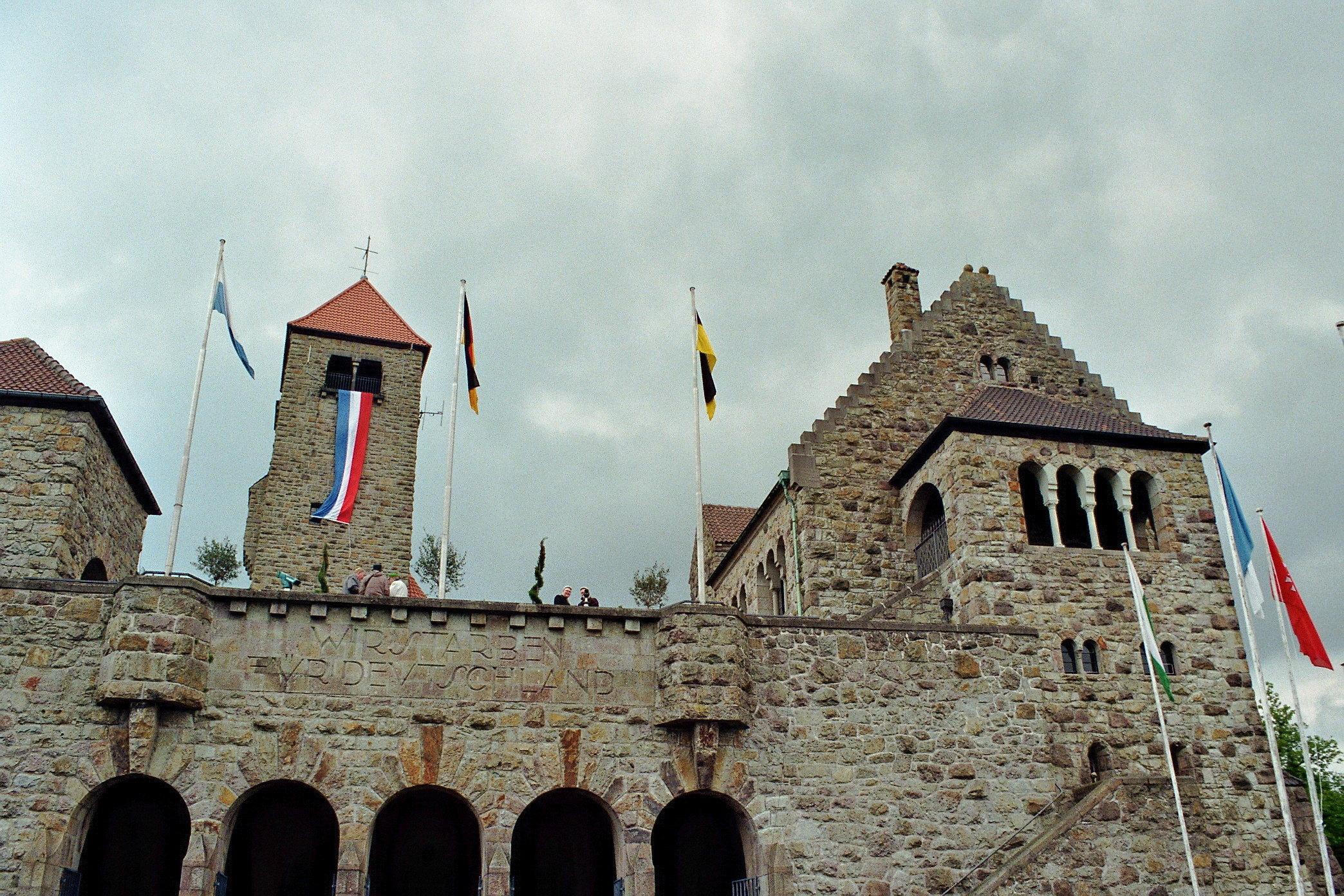 Wachenburg Castle close to Weinheim (Germany), May 15, 2010 Wachenburg bei Weinheim, aufgenommen am 15. Mai 2010